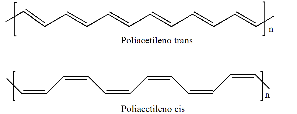 Estructuras cis y trans de poliacetileno